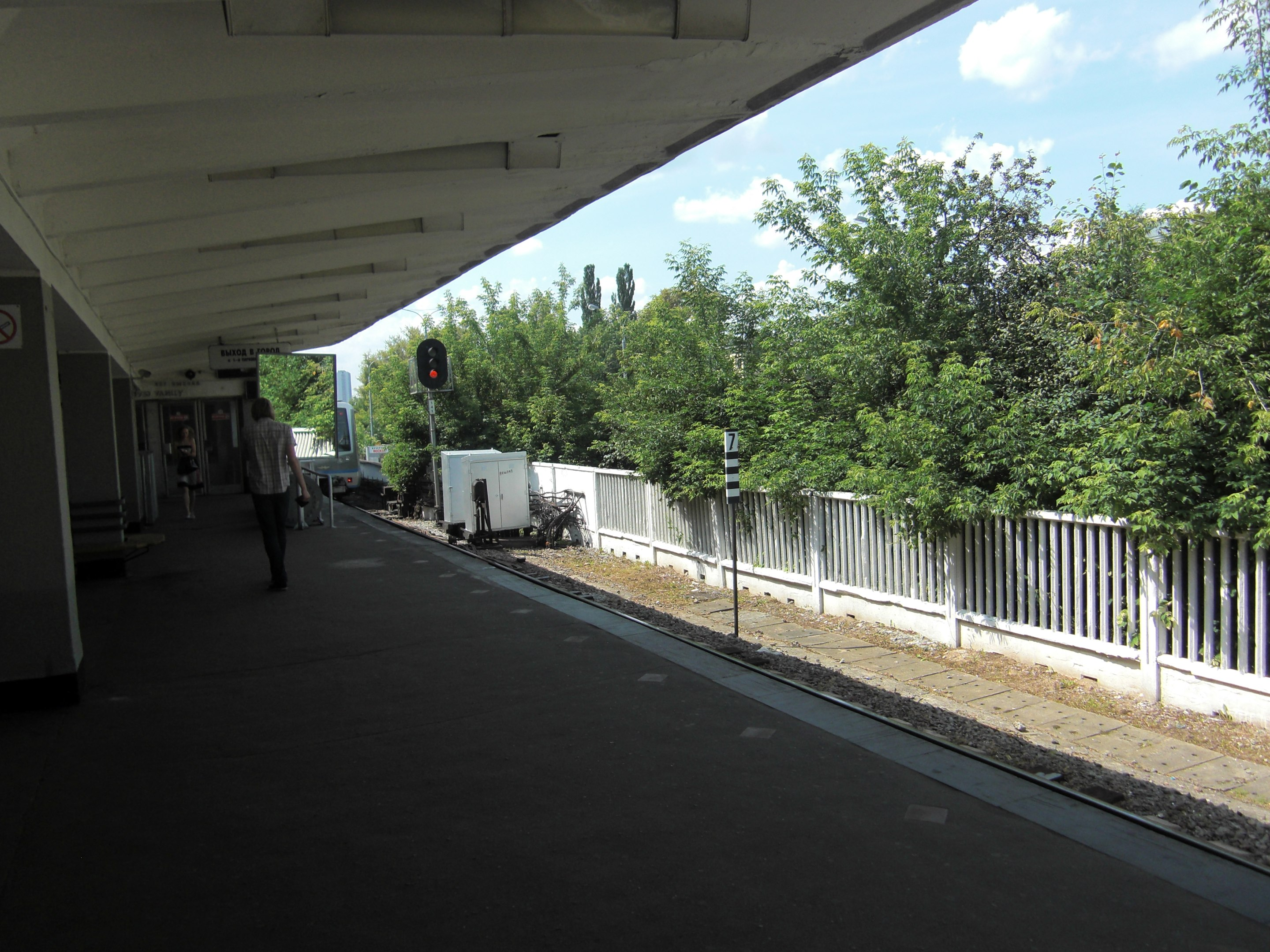 Izmaylovskaya (Измайловская)